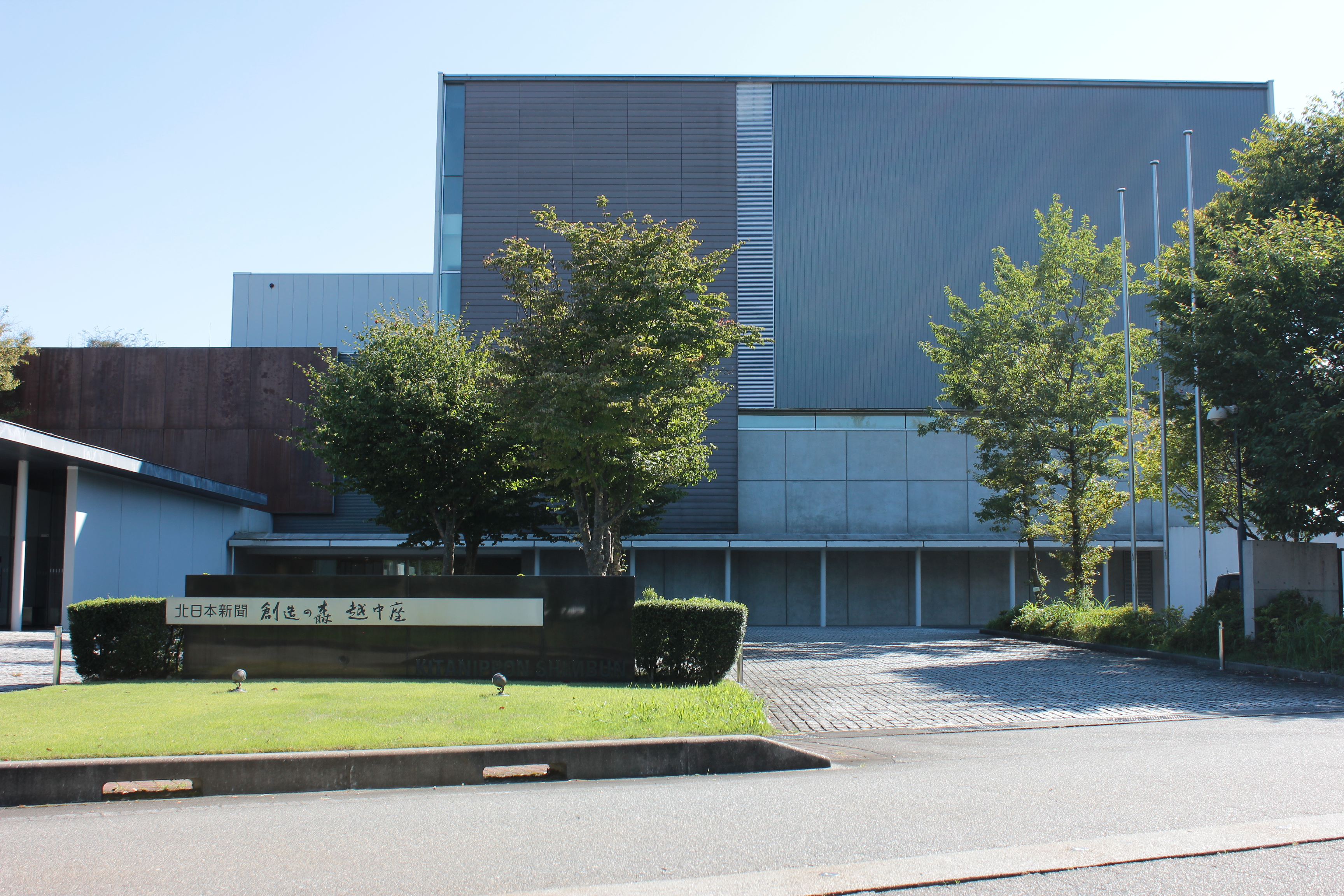 創造の森 越中座（富山県富山市） Canon EOS Kiss X5